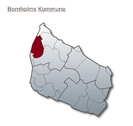 Rutsker Sogn